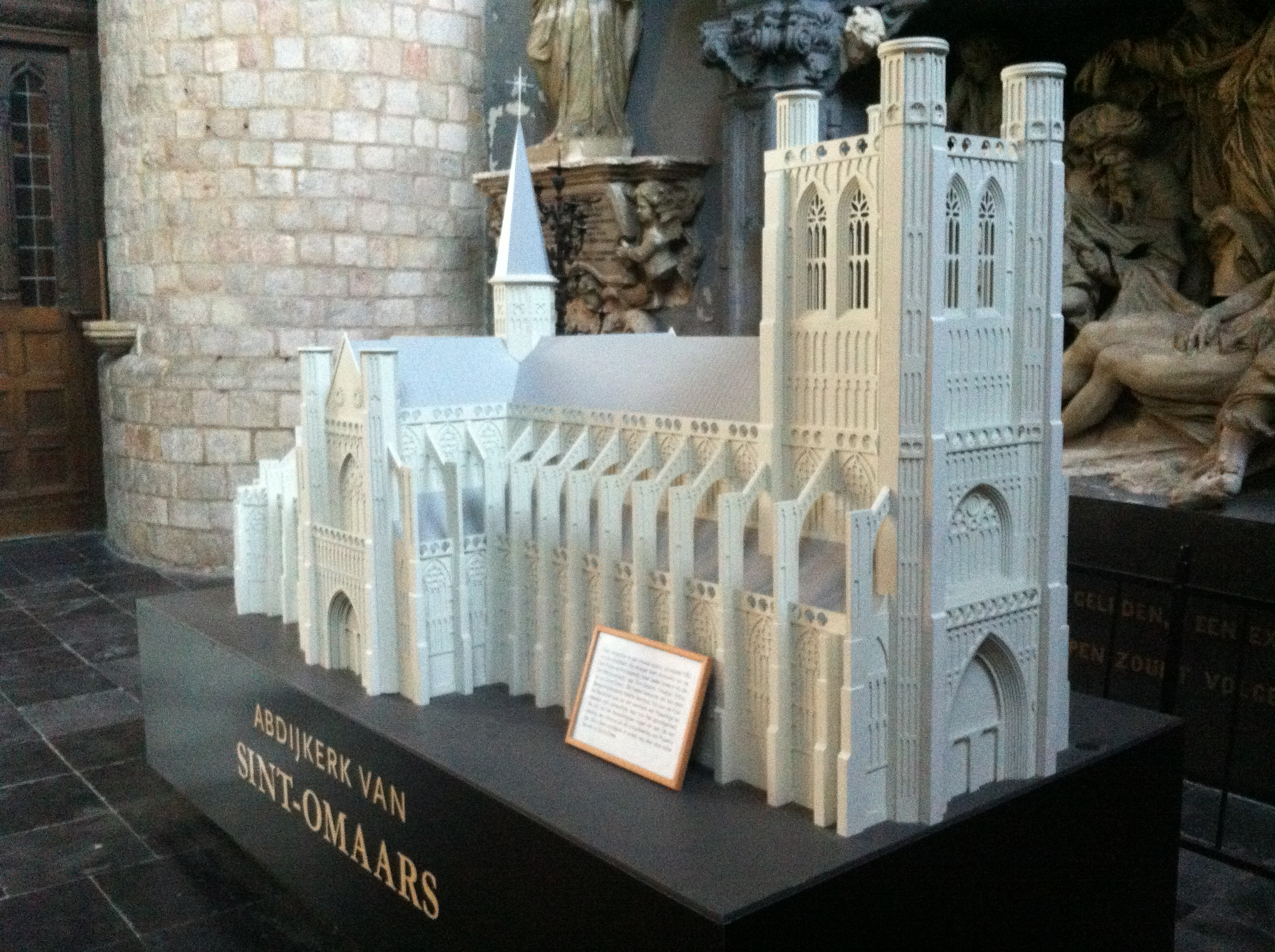 Maquette van de Abdijkerk van Sint-Omaars. Getrouwe replica op schaal 1/50 van de abdijkerk, die vroeger deel uitmaakte van de Sint-Pieter-en-Paulusabdij (later bekend als de Sint-Bertinusabdij) van Sint-Omaars. (Sint-Bertinuskerk, Poperinge, 14/10/2011.)